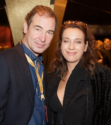 Acteur Erik de Vogel (GTST) en actrice Marjolein Keuning bij de Europese première van het Cirque du Soleil in Amsterdam (oktober 2010)